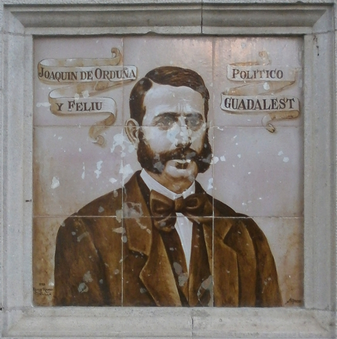 Retrato de Joaquín de Orduña y Feliu. Jardín de las Celebridades, Diputación de Alicante, España